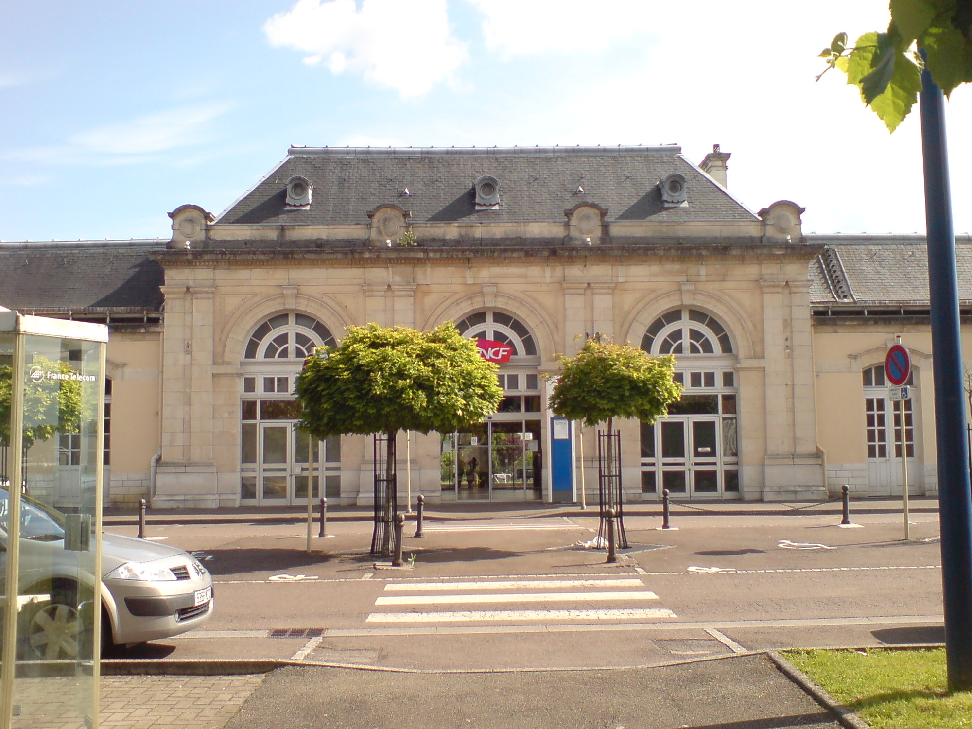 Ceci est l'entrée de la gare de Lure